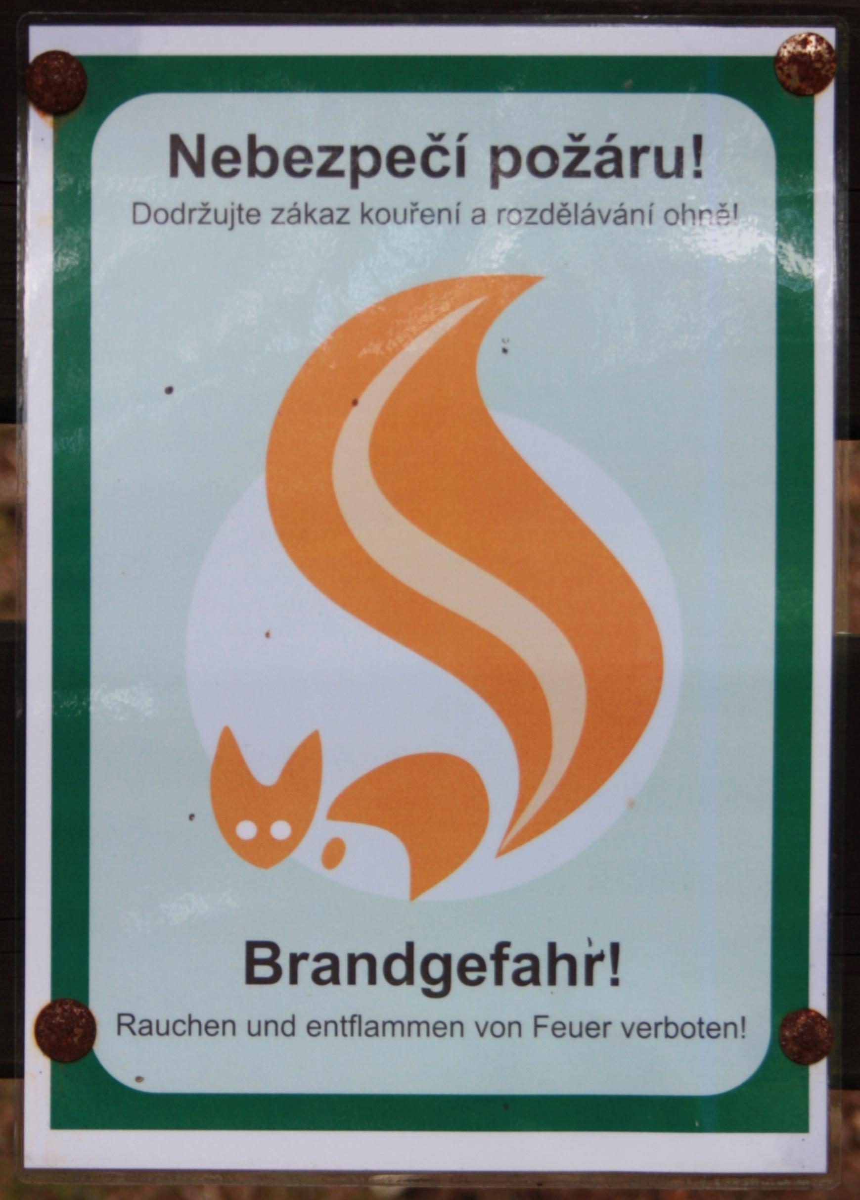 České Švýcarsko